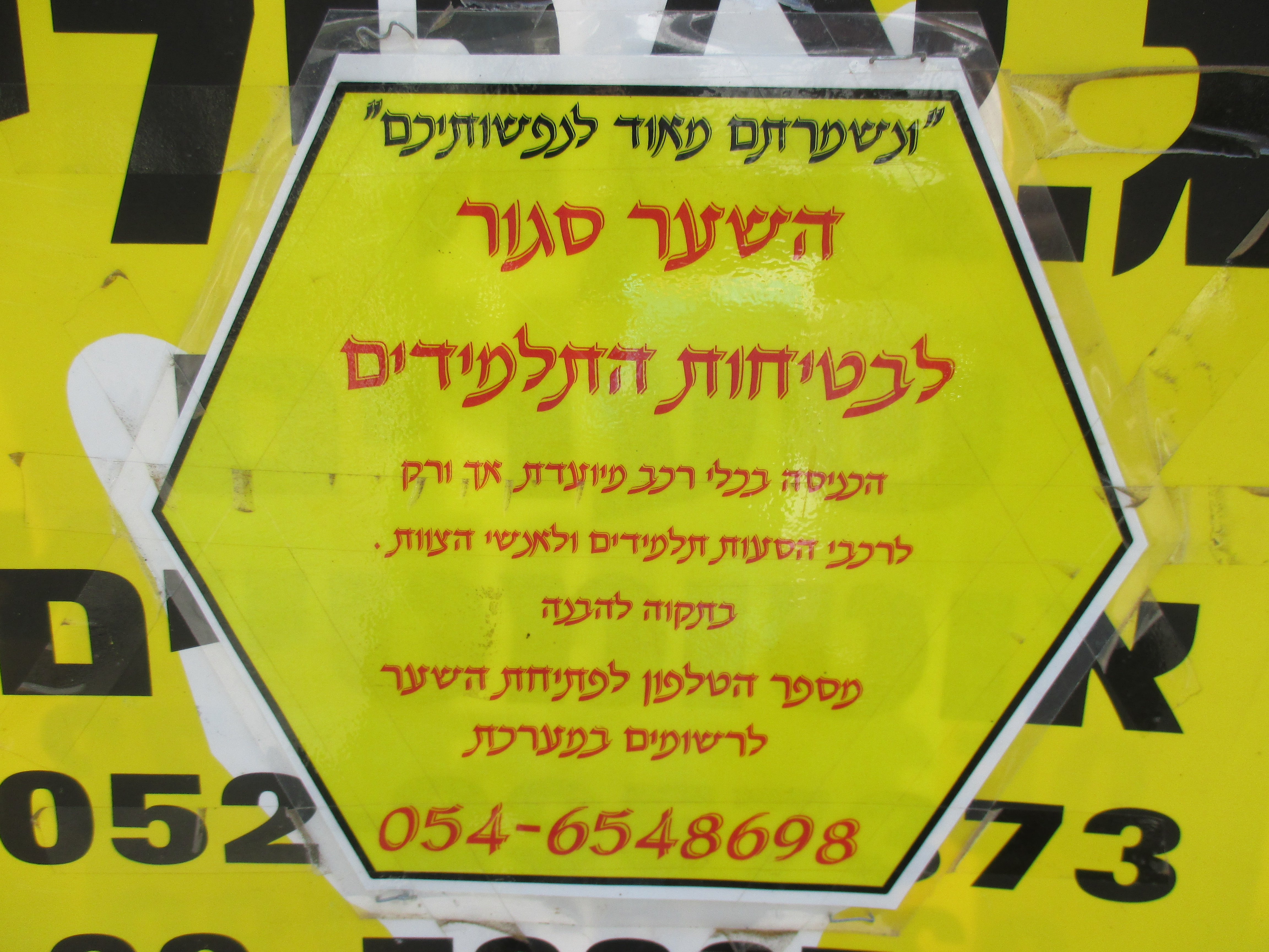 מודעה על שער חשמלי שניתן לפתוח באמצעות שיחת טלפון